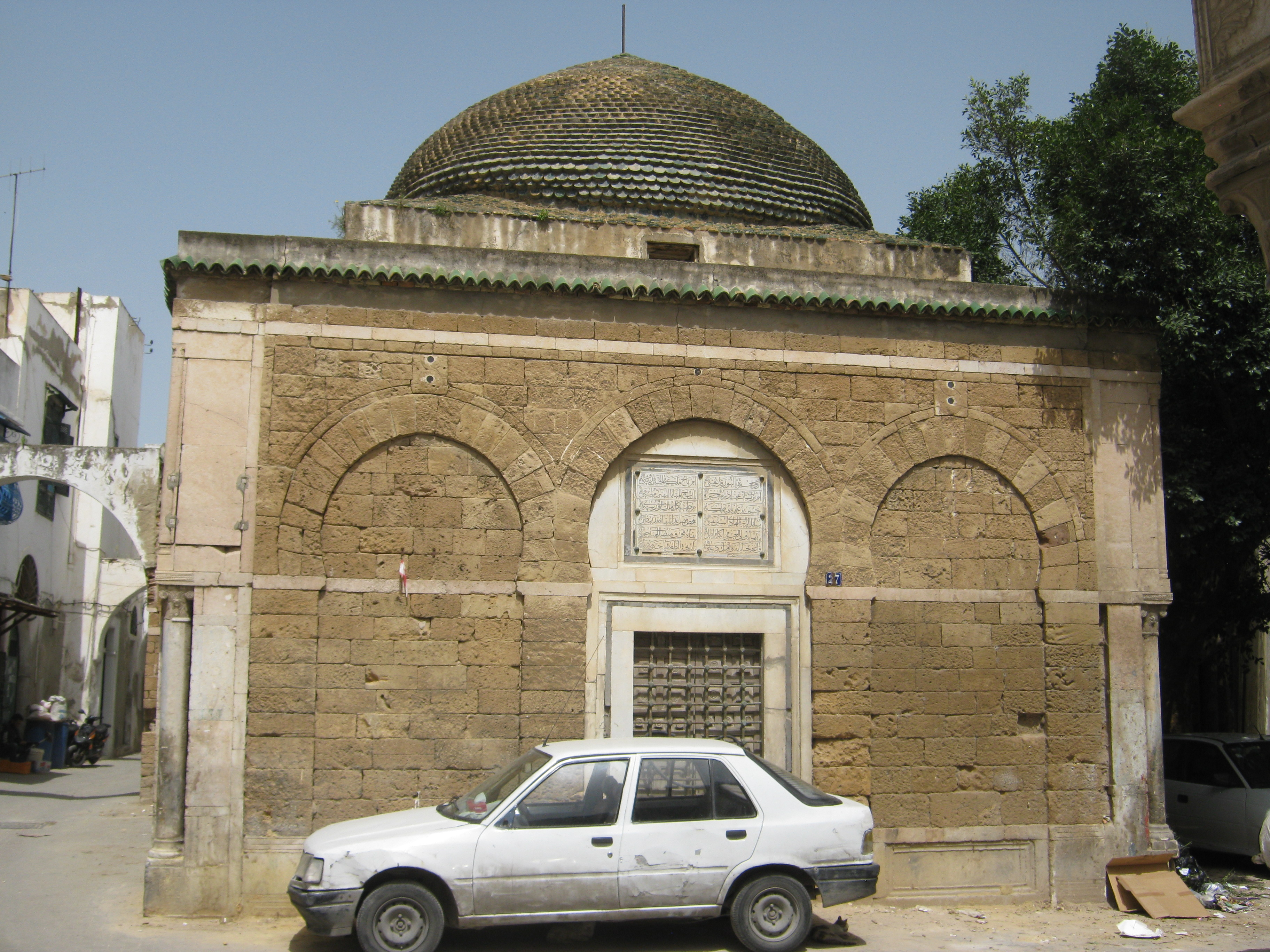 mausolée du fondateur de la dynastie husseynide